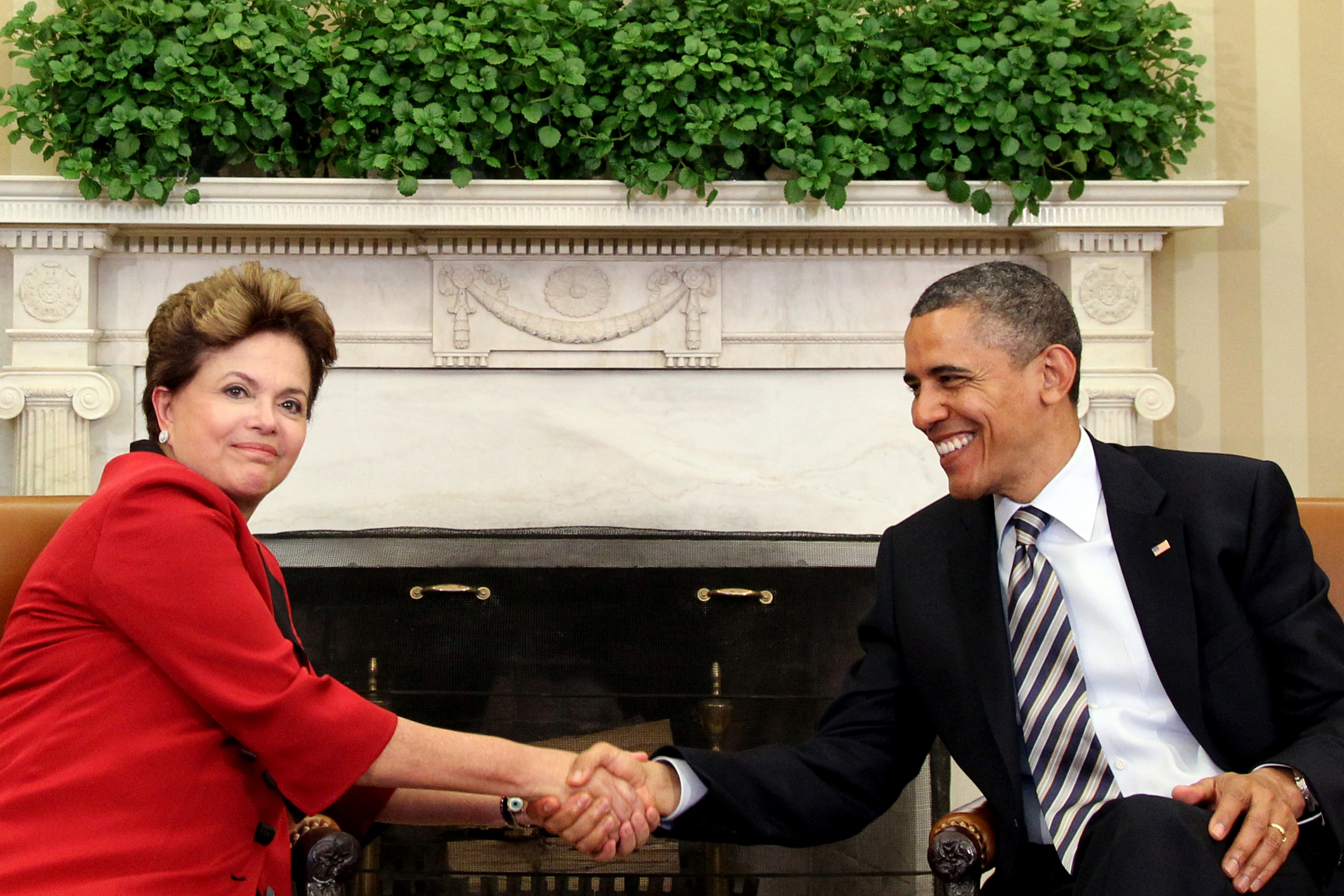 Washington (EUA) - Presidenta Dilma Rousseff cumprimenta o presidente dos Estados Unidos, Barack Obama, durante encontro na Casa Branca